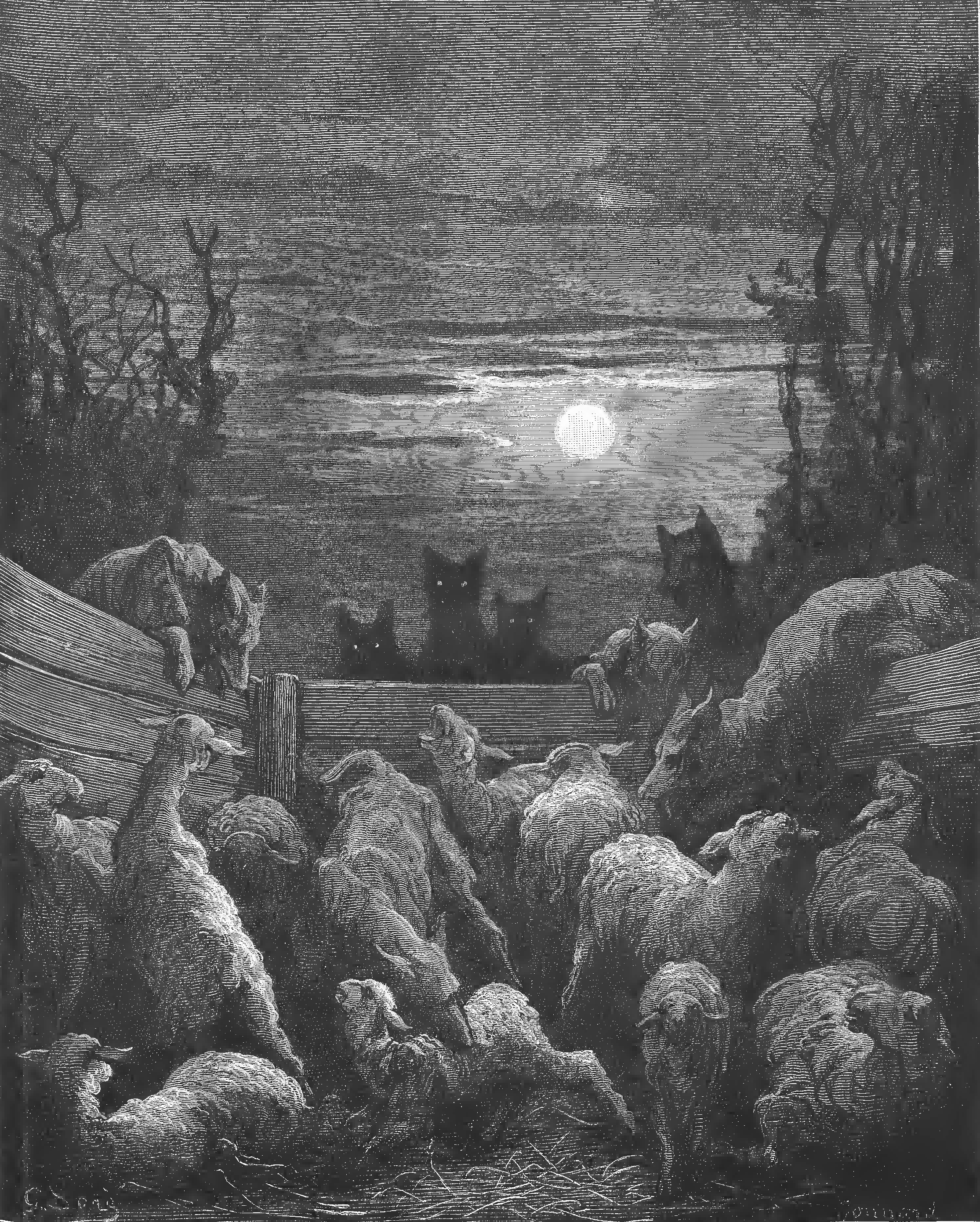 grafika z książki PL publikacja: Nakładem i drukiem Jana Noskowskiego, Warszawa 1876